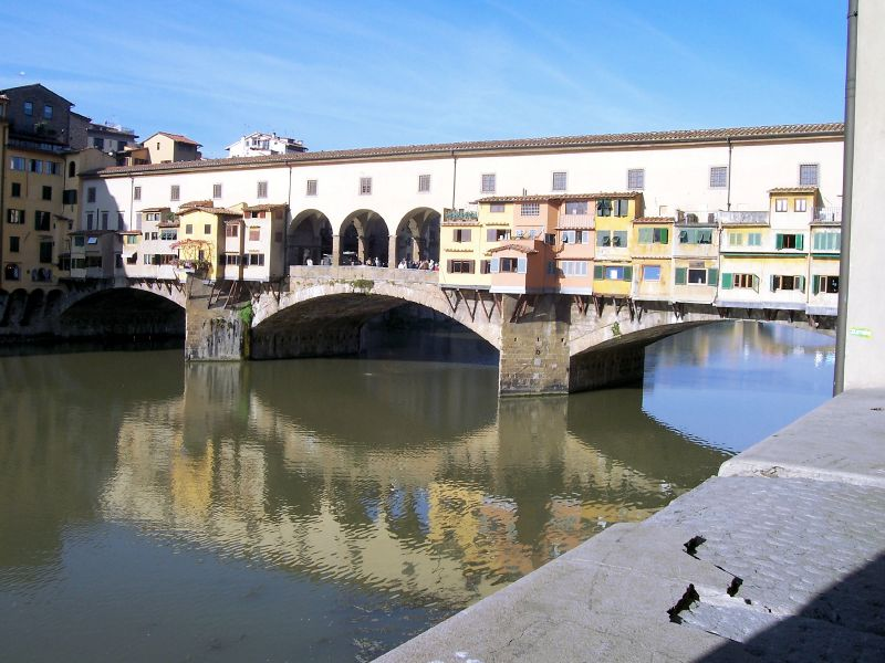 Ponte Vecchio, Firenze, Italy.